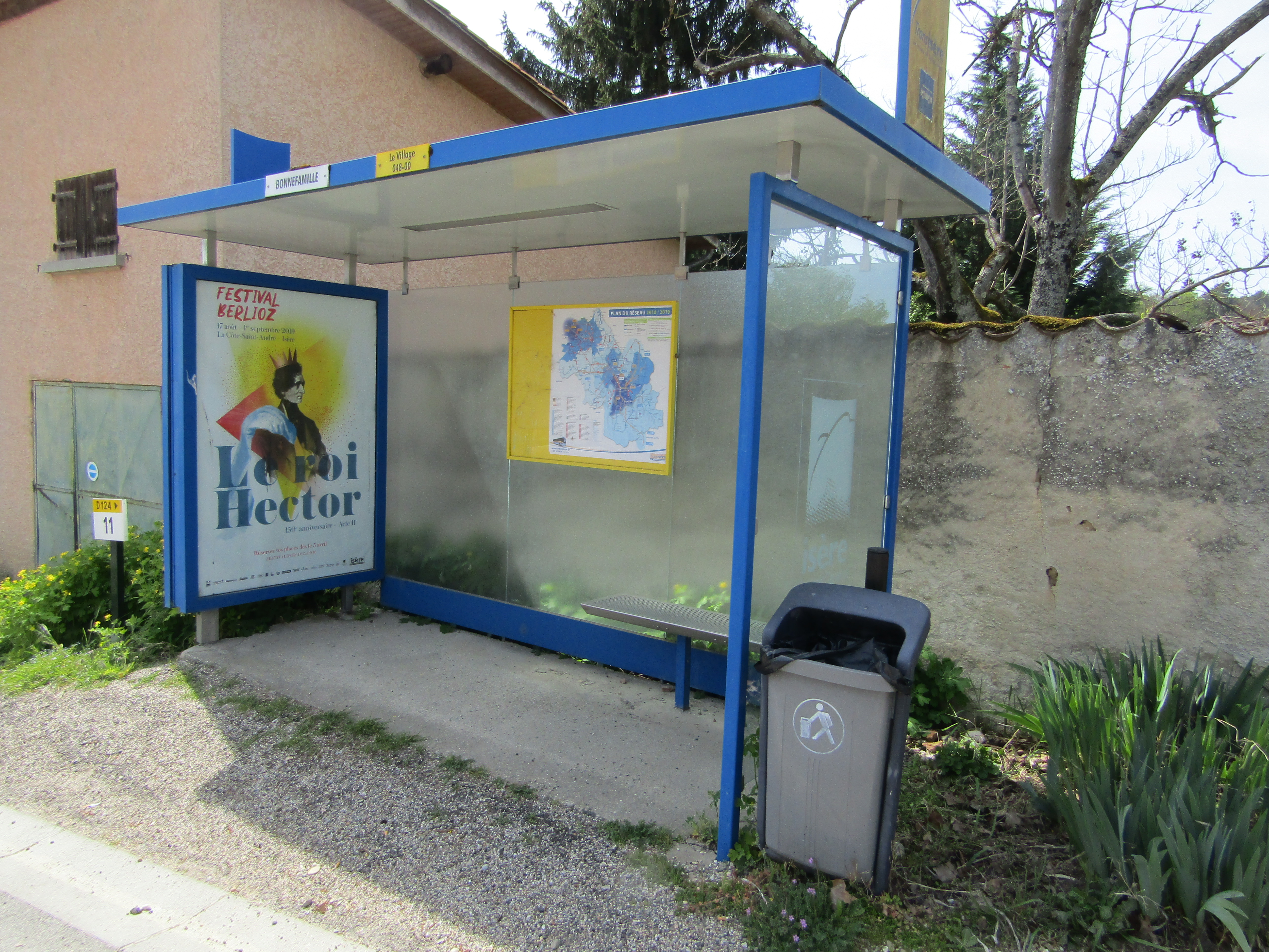 Arrêt de car (bus stop) du village de Bonnefamille le 18 avril 2019